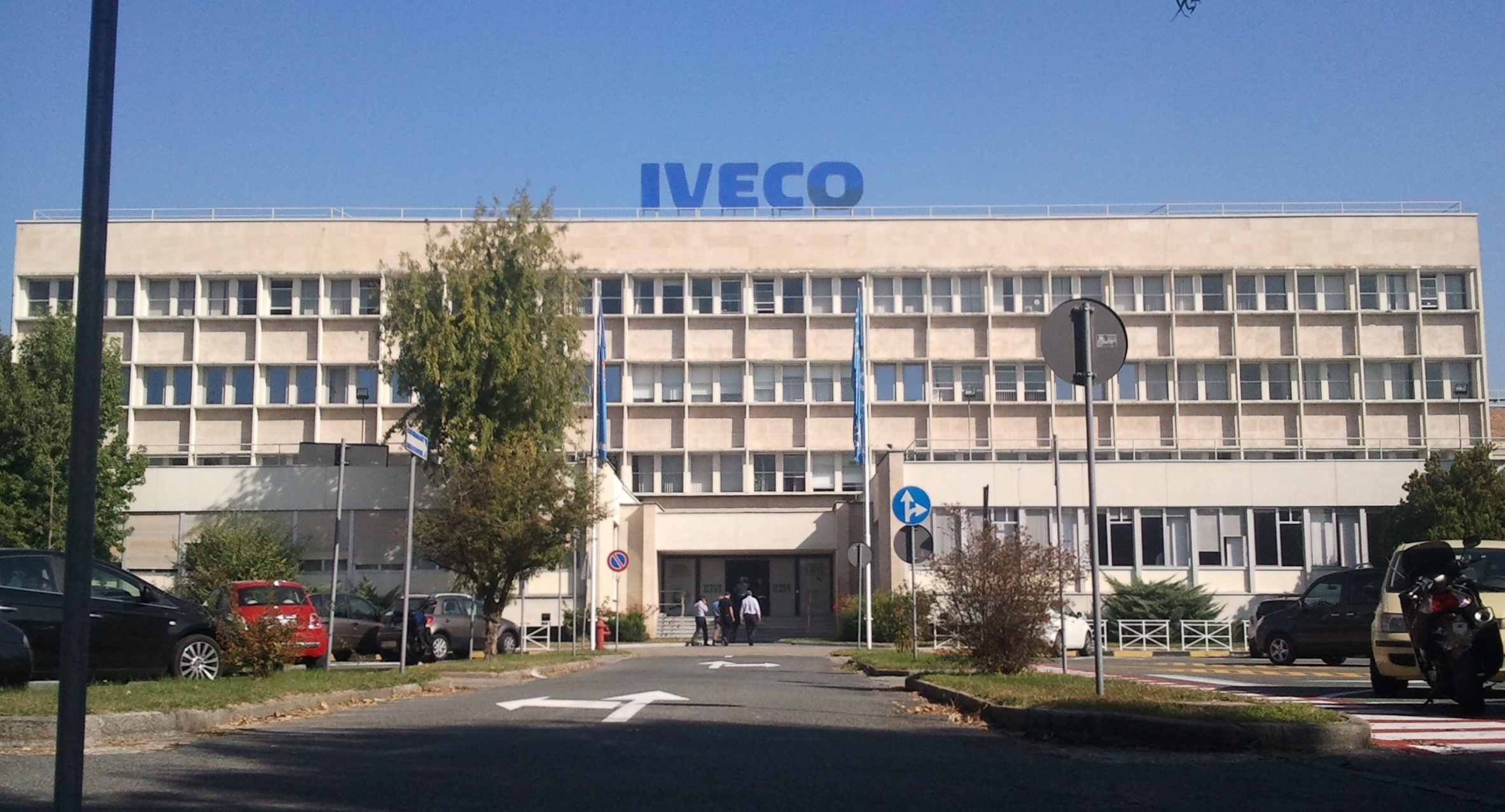 Iveco World Headquarters. Torino. Italy